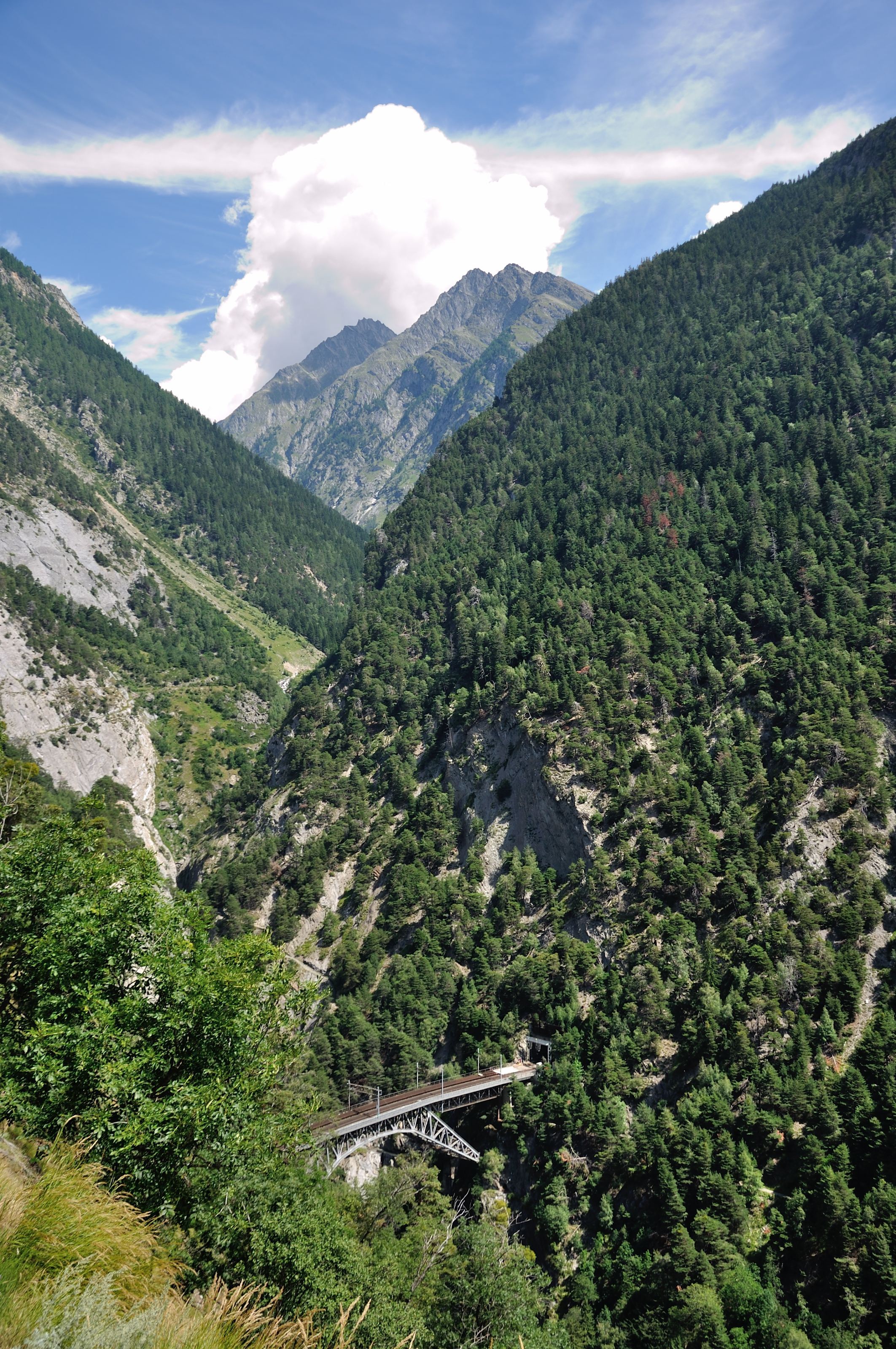 Switzerland, Valais, hike on Lötschberg Südrampe